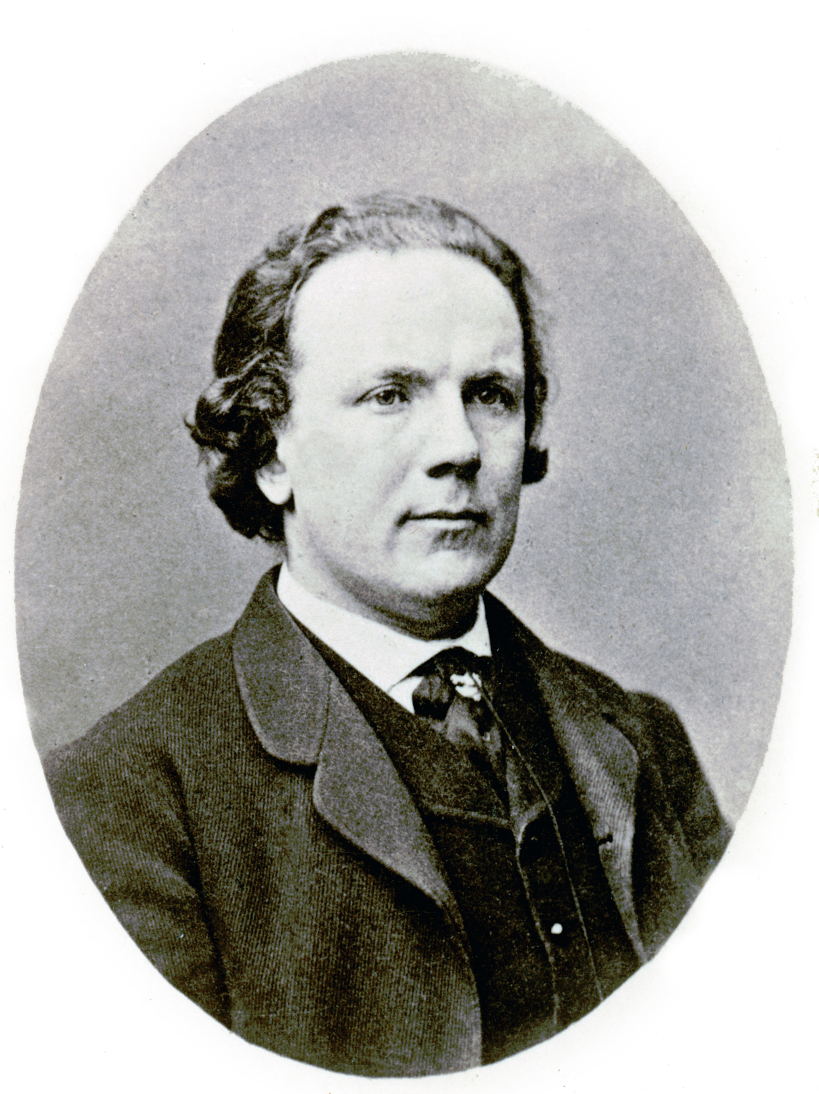 Oscar Arnoldson, operasångare. Odaterat porträtt